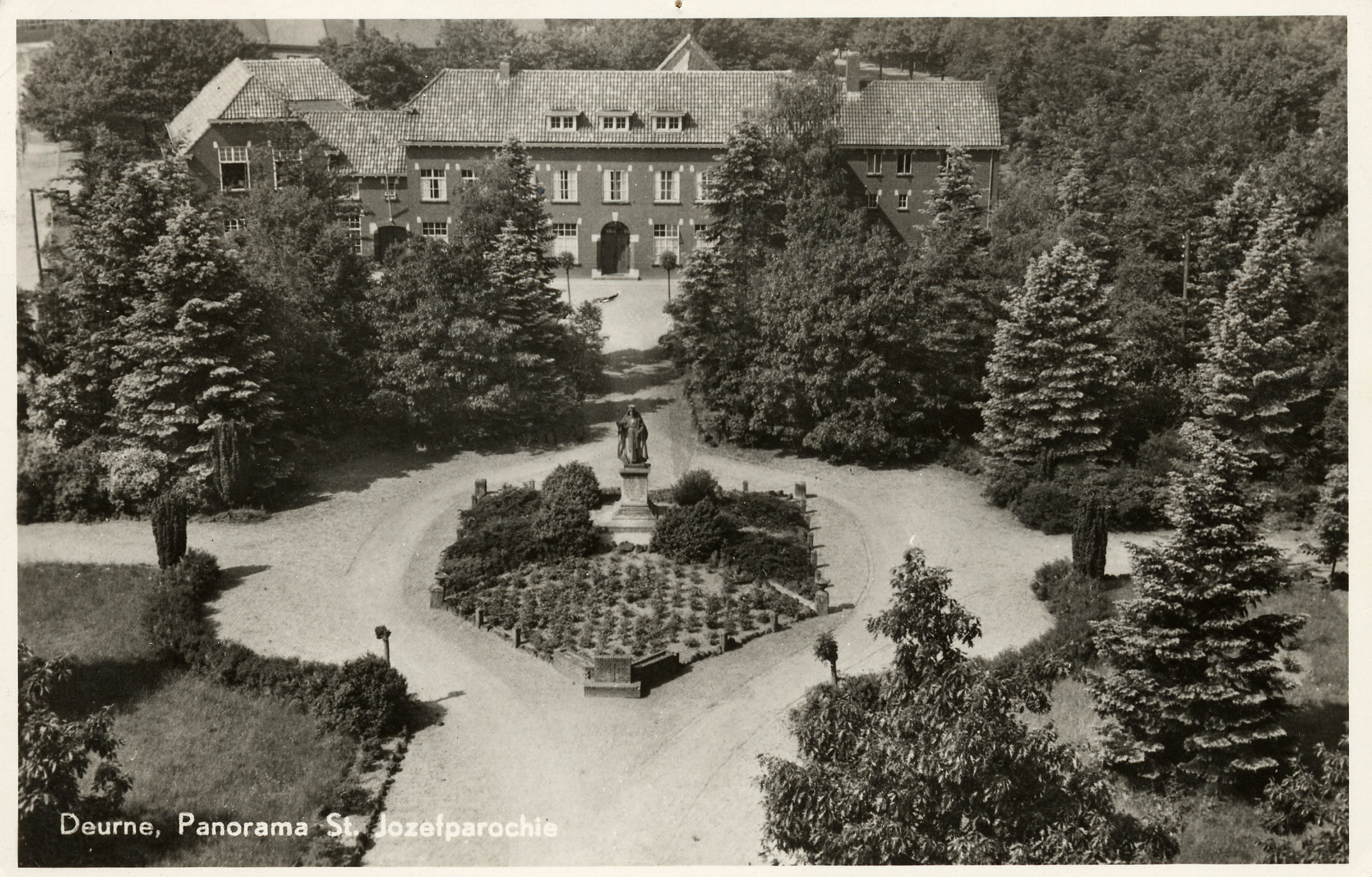 Het voormalige Heili Hartpark met het Heilig Hartbeeld in de Sint-Jozefparochie. Foto coll.Thom van der Straaten.